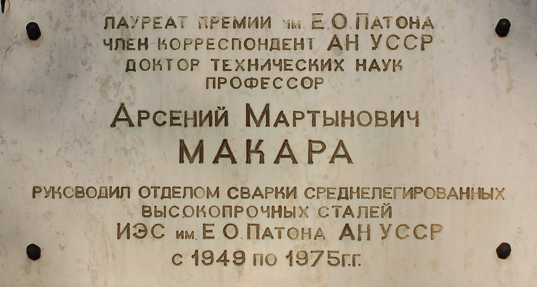 Меморіальна дошка А. М. Макарі на будівлі Інституту електрозварювання ім. Є. О. Патона (Київ, вул. Горького, 69, на території).